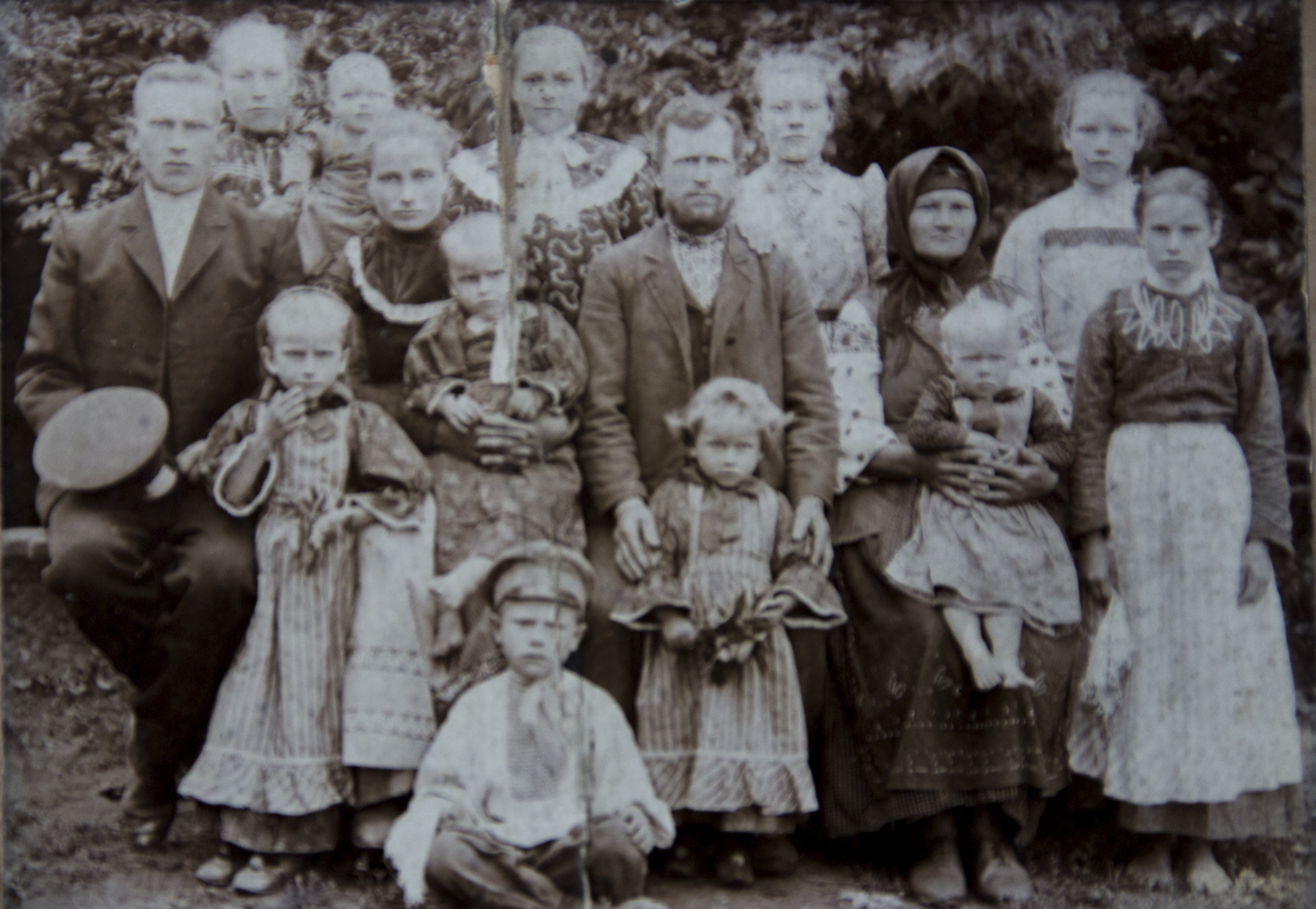 Брати Кирило та Семен Стовповський з сім